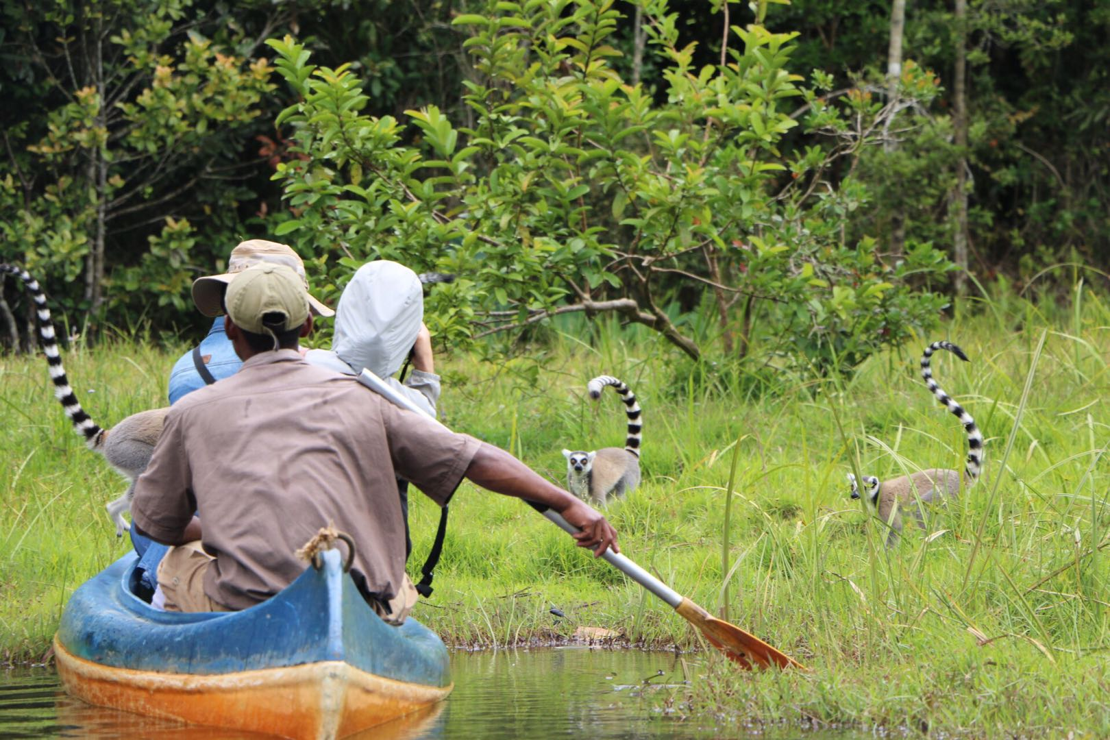 带着游客看狐猴的船夫 This is an image of "African people at work" from Madagascar